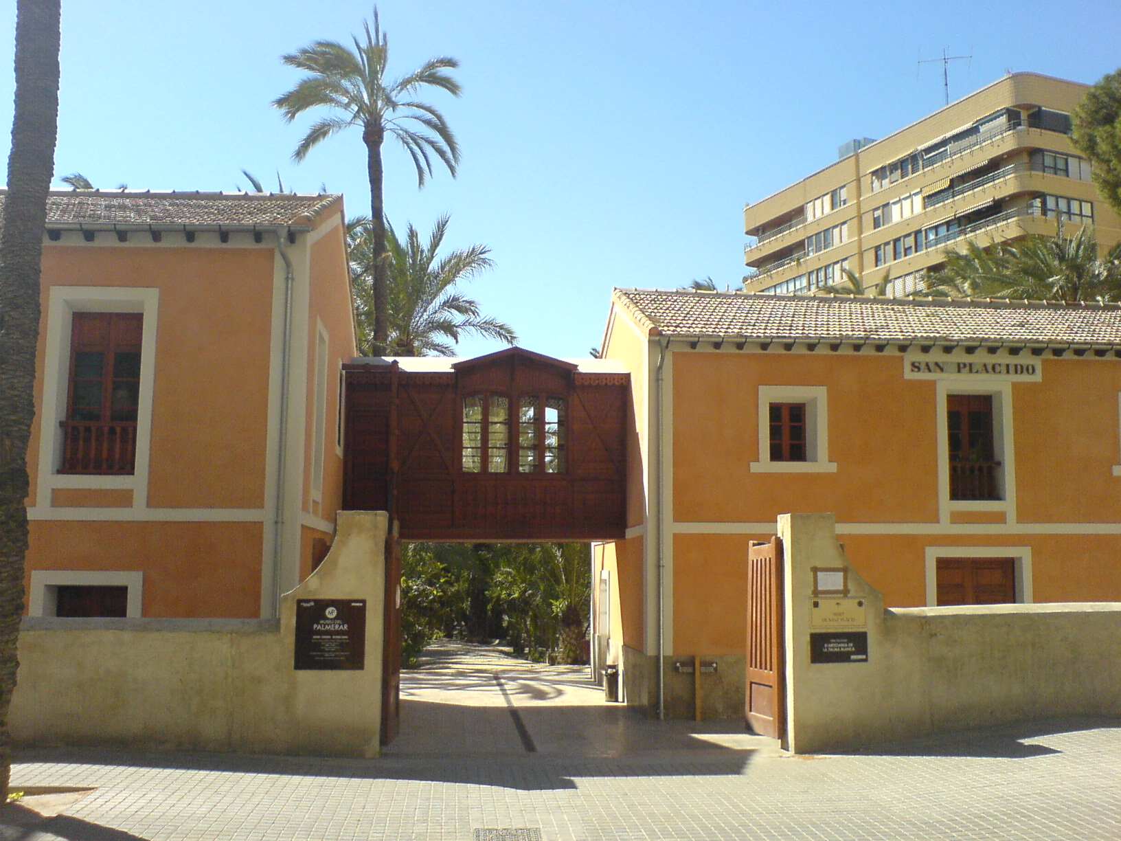 Museo del Palmeral. Elche (Alicante)